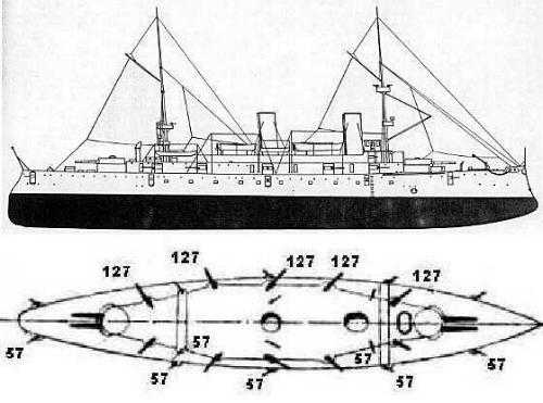 Схема крейсера "Олимпия" Источник: Датировка: кон. 19 в. Автор: неизвестен